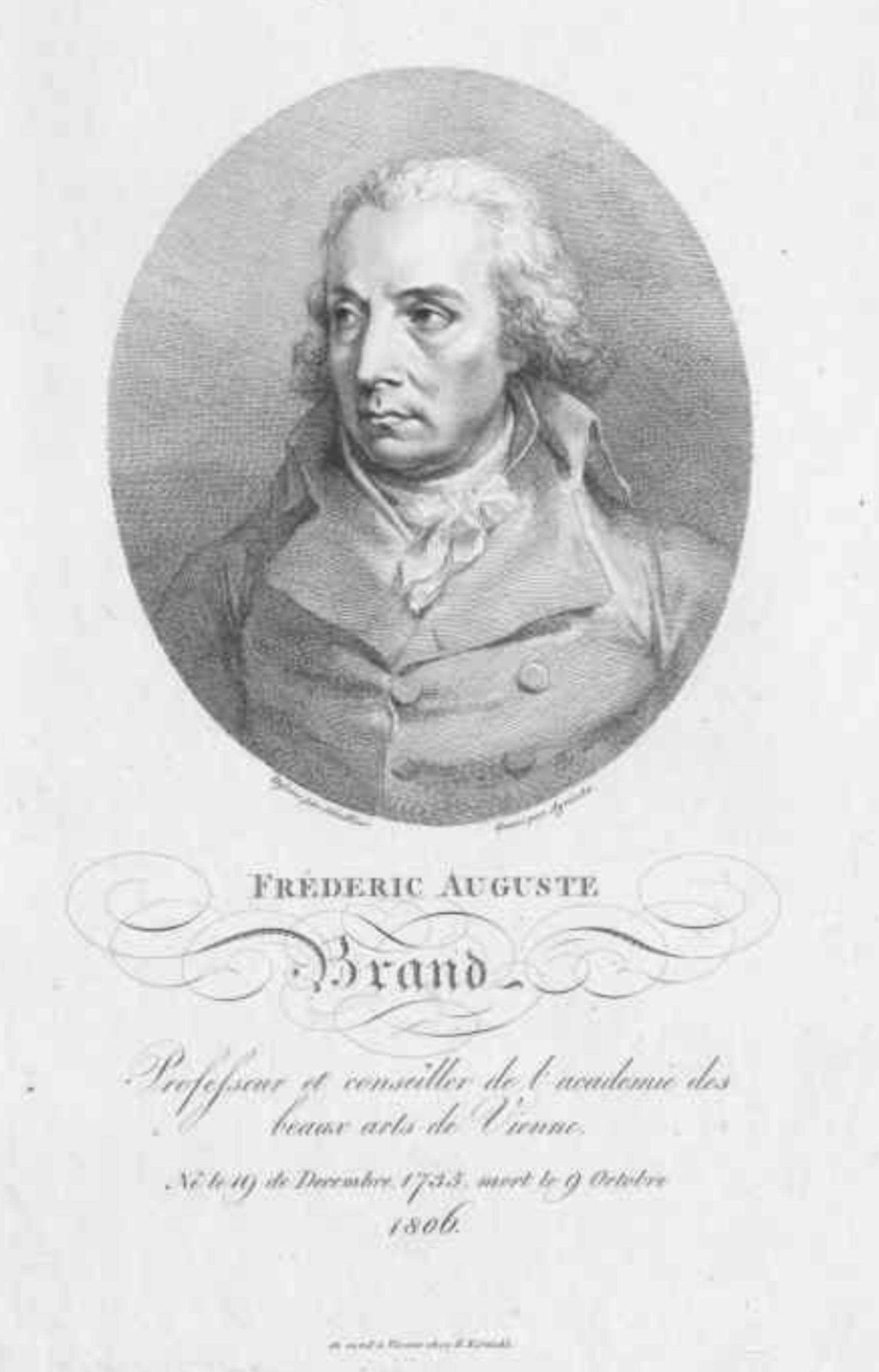 Friedrich August Brand (* 20. Dezember 1735 in Wien; † 9. Oktober 1806 ebenda), österreichischer Maler